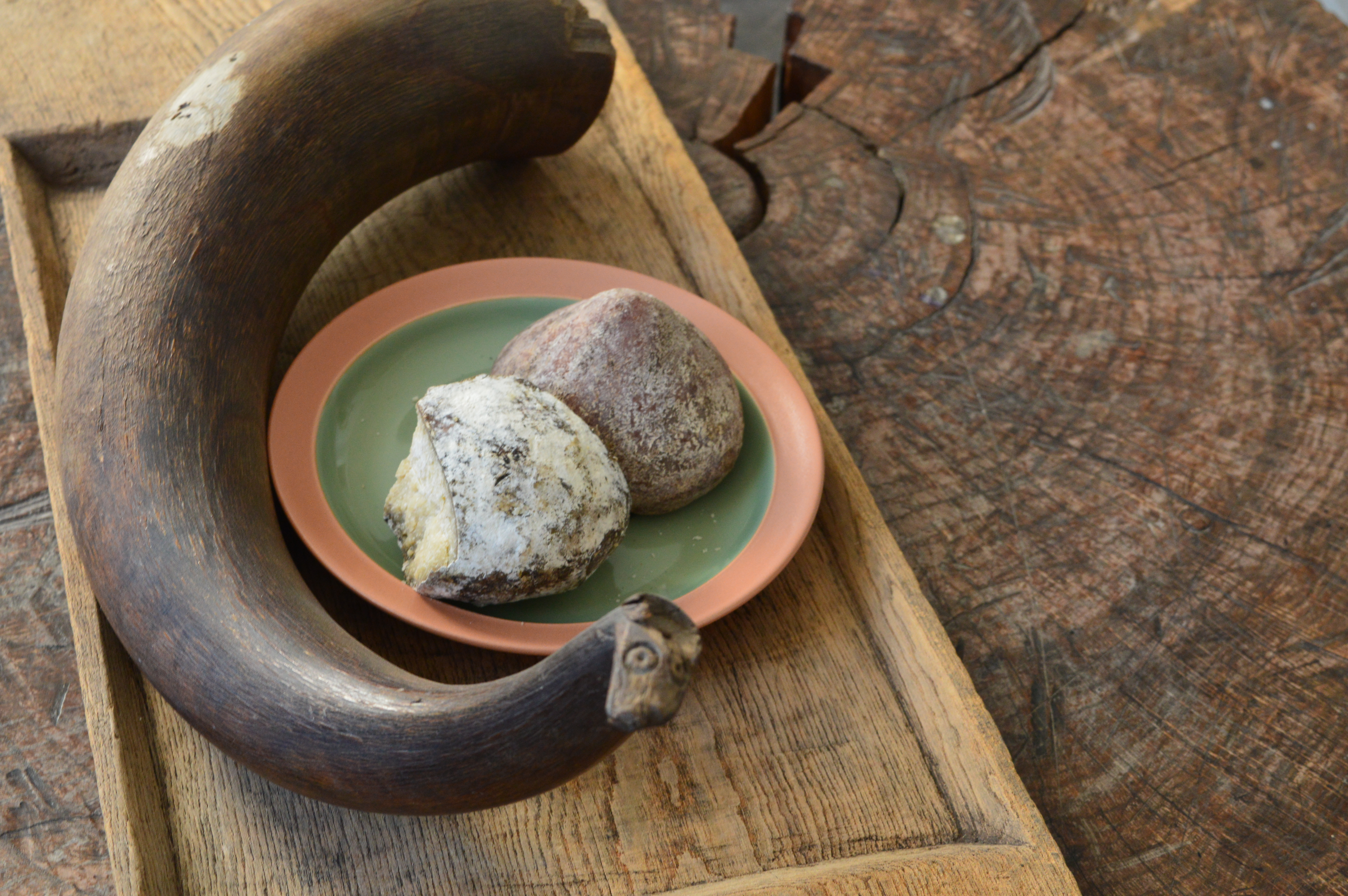 ფშაური ტრადიციული კერძი „დამბალხაჭო“.